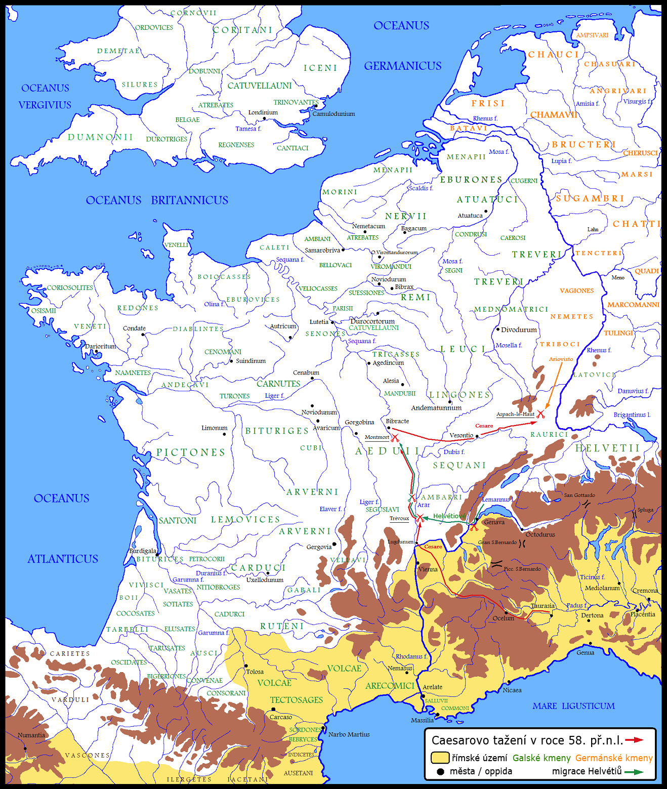 Caesarova kampaň v Galii v roce 58 př.n.l